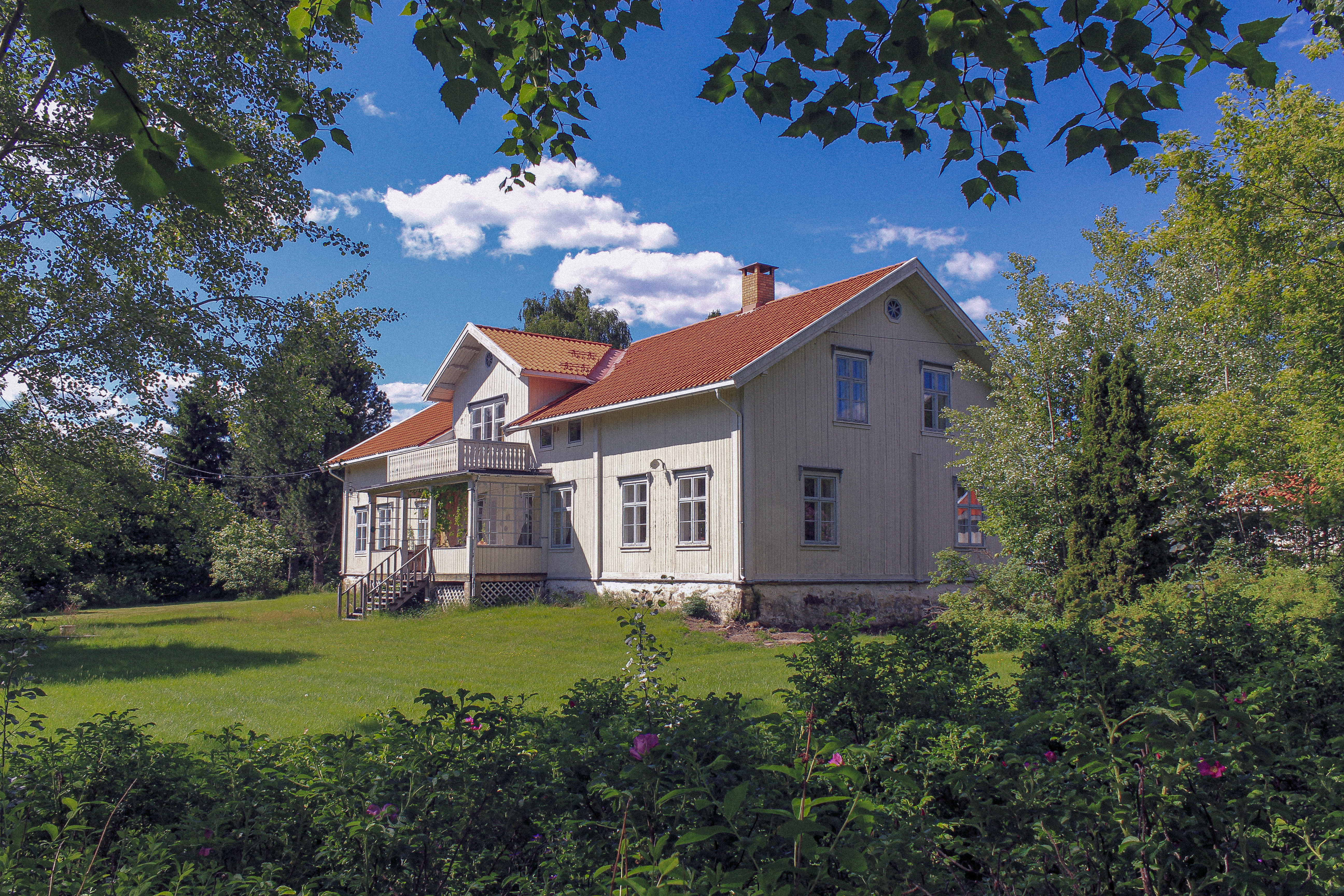 Presteboligen i Hurdal.